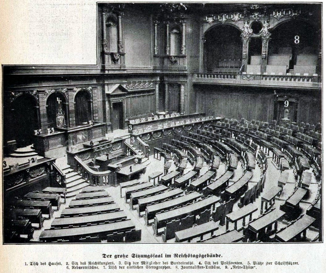 Großer Sitzungssaal des Deutschen Reichstages Berlin, 1903